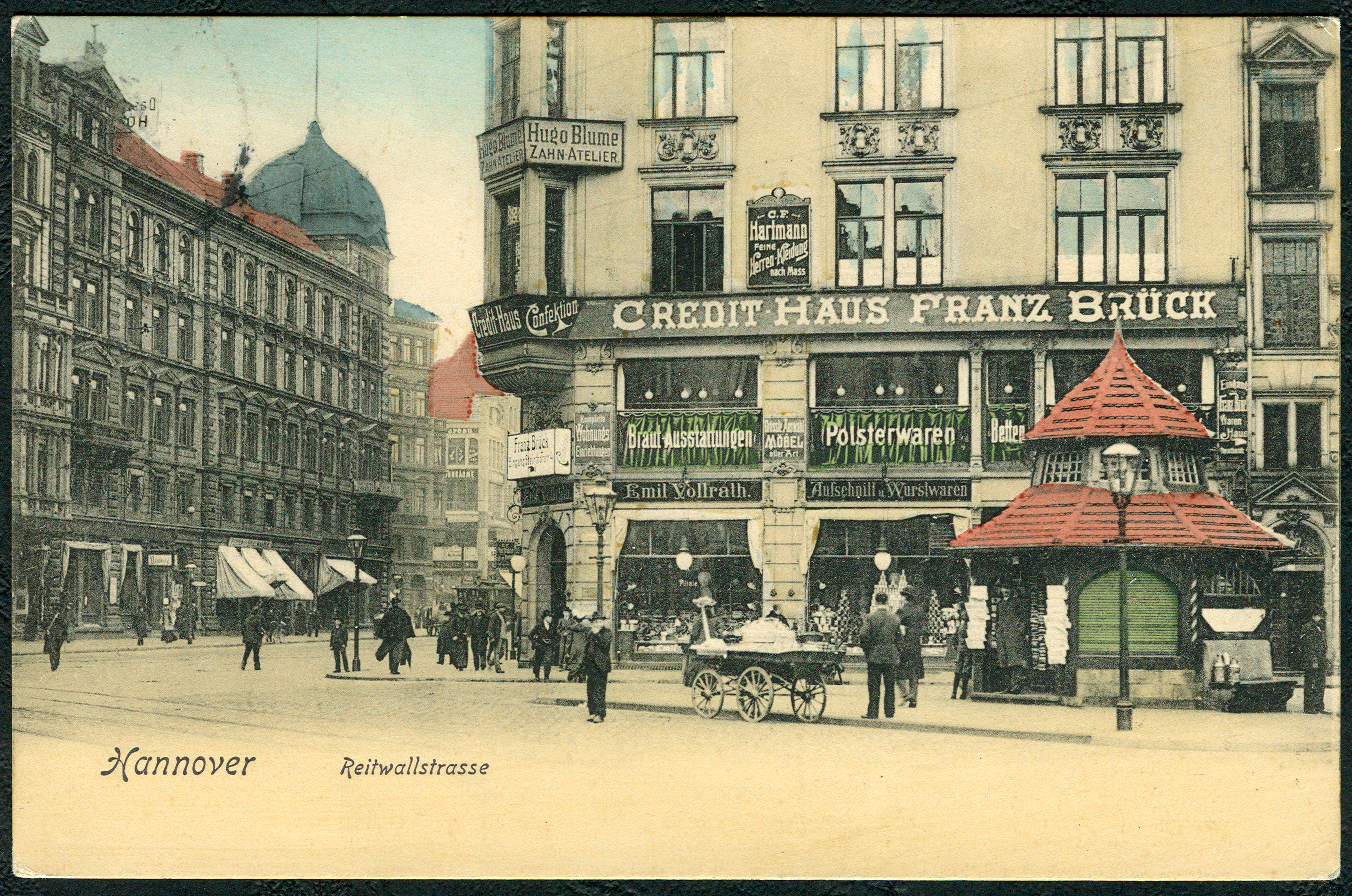 Kolorierte Ansichtskarte eines anonymen Fotografen im Vertrieb der Norddeutschen Papier-Industrie mit einer Ansicht der Reitwallstraße um 1900 in Hannover. In dem Eckgebäude im Vordergrund betrieb Hugo Blume sein Zahn-Atelier, bot C. F. Hartmann seine "Feine Herren-Kleidung nach Mass", während das Credit-Haus Franz Brück seine Kunden um Benutzung des Eingangs in der Steintorstraße 4 bat. Mit der angekündigten größten Auswahl an Möbeln konnten sie "Komplette Wohnungs-Einrichtungen" erwerben, ferner Braut-Ausstattungen, Polsterwaren und Betten. Im Erdgeschoss betrieb die Großfleischerei Emil Vollrath eine Filialie. Im Vordergrund ein einzeln stehender Kiosk mit Zeitungsverkauf und großen Milchkannen auf der rückseitigen Bank ...